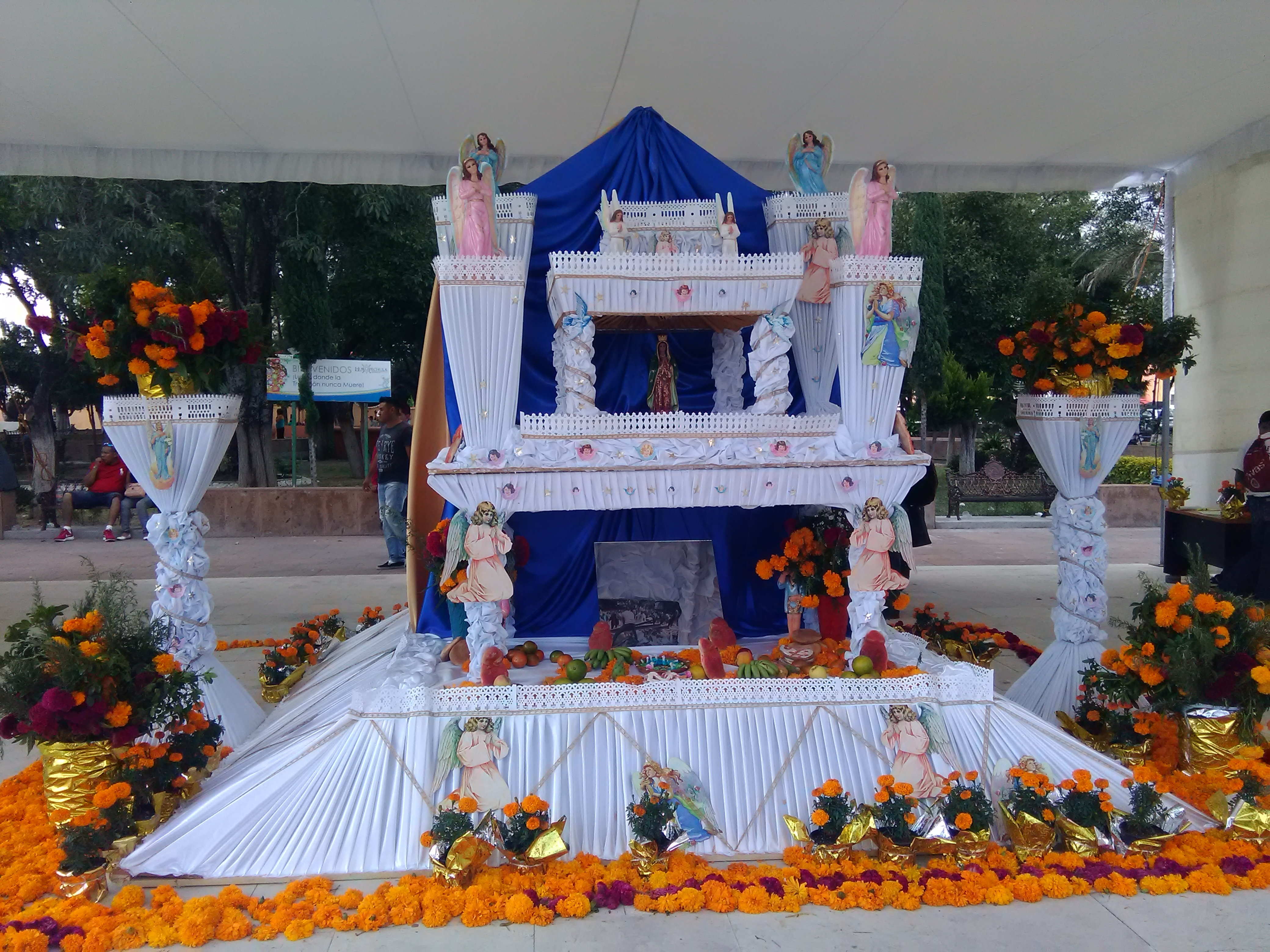 Ofrenda en Centro de Huaquechula, Puebla